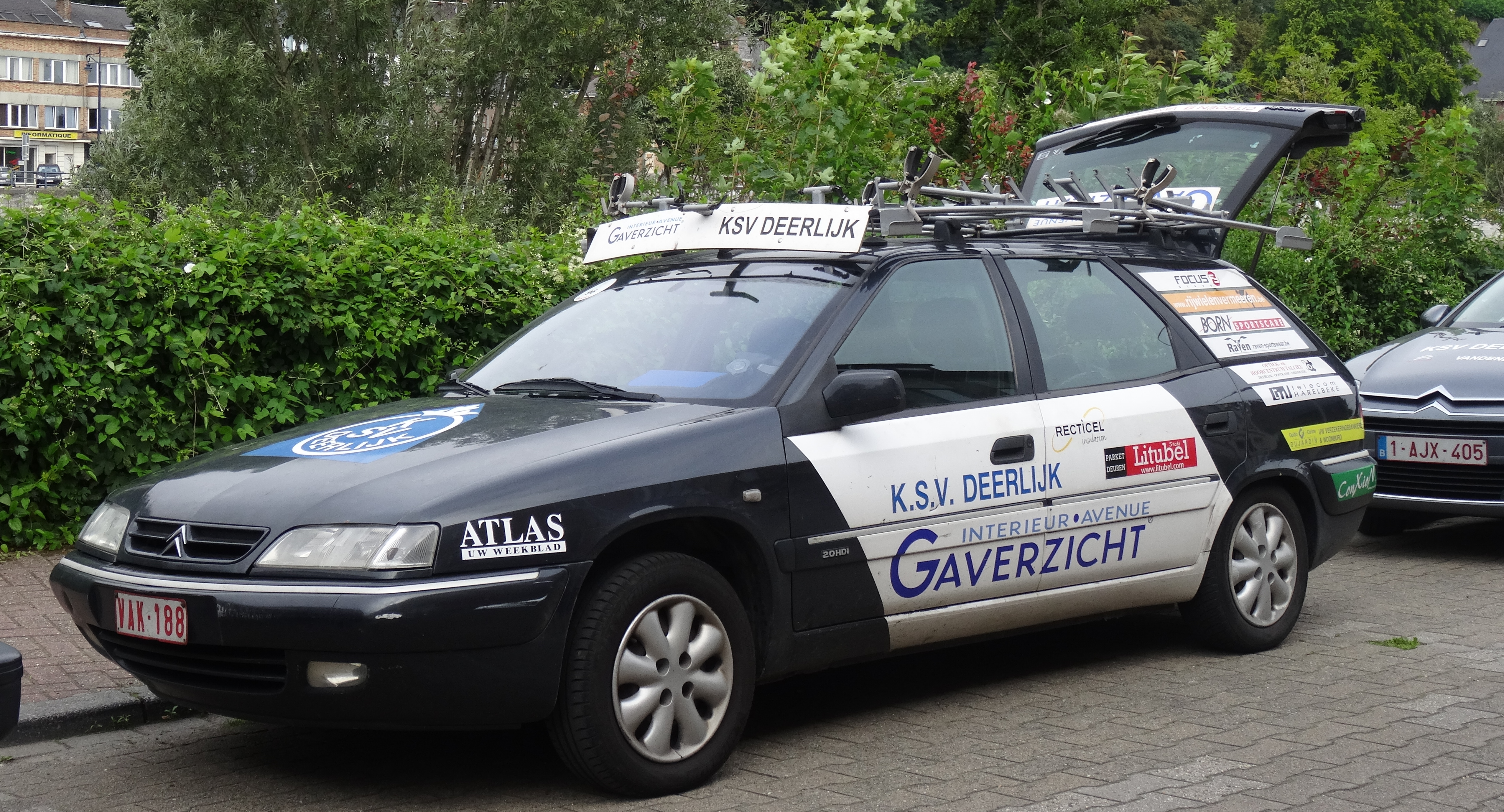 Reportage photographique réalisé le mercredi 6 août à l'occasion du départ de la première étape du Tour de la province de Namur 2014 à Jambes (Namur), Belgique.